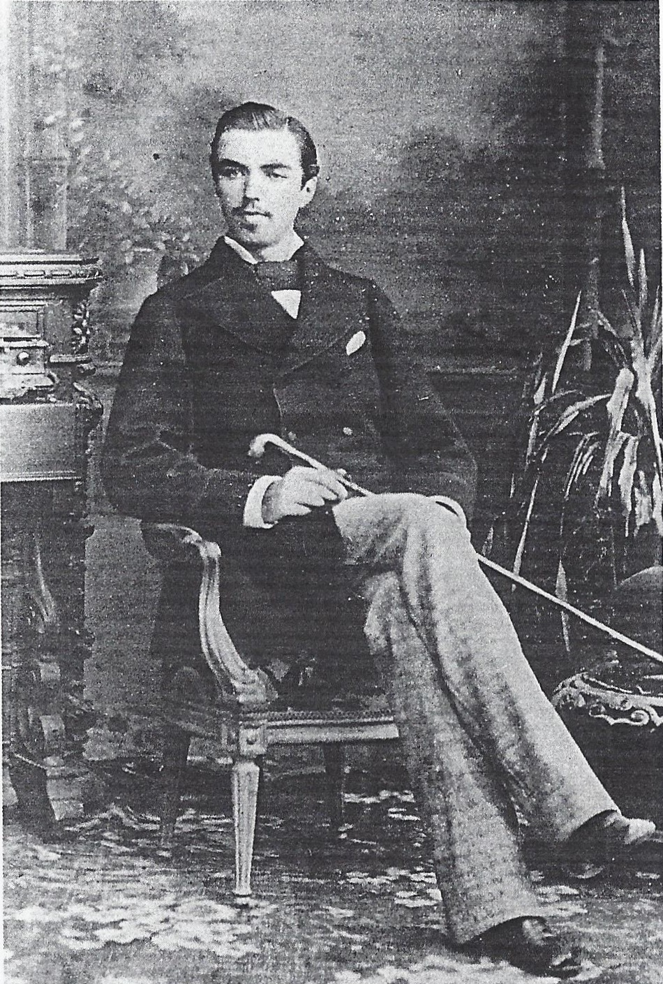 Photographie von Maximilian Bertram von Nesselrode-Ehreshoven